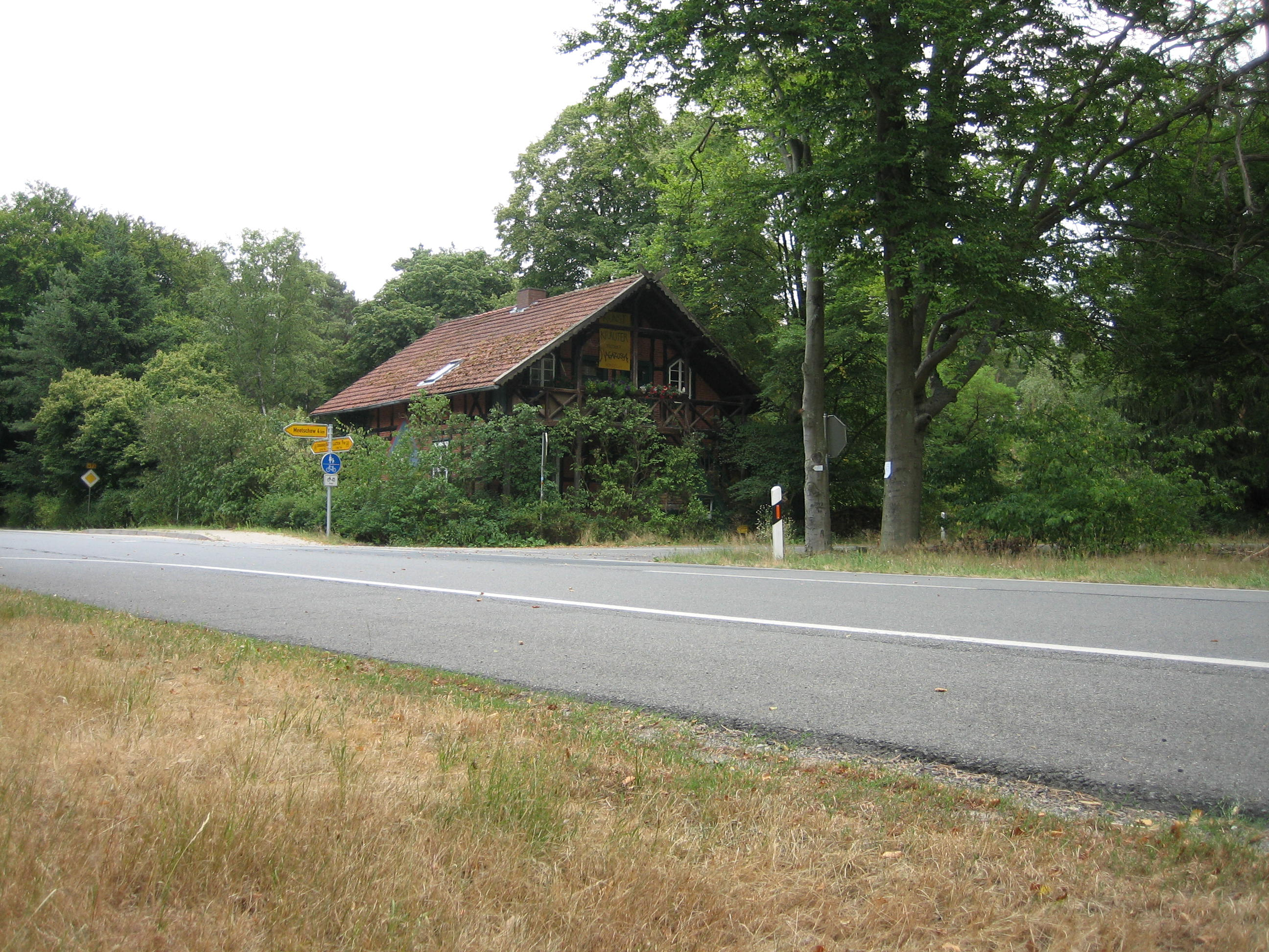 Rondel im gemeindefreien Gebiet Gartow